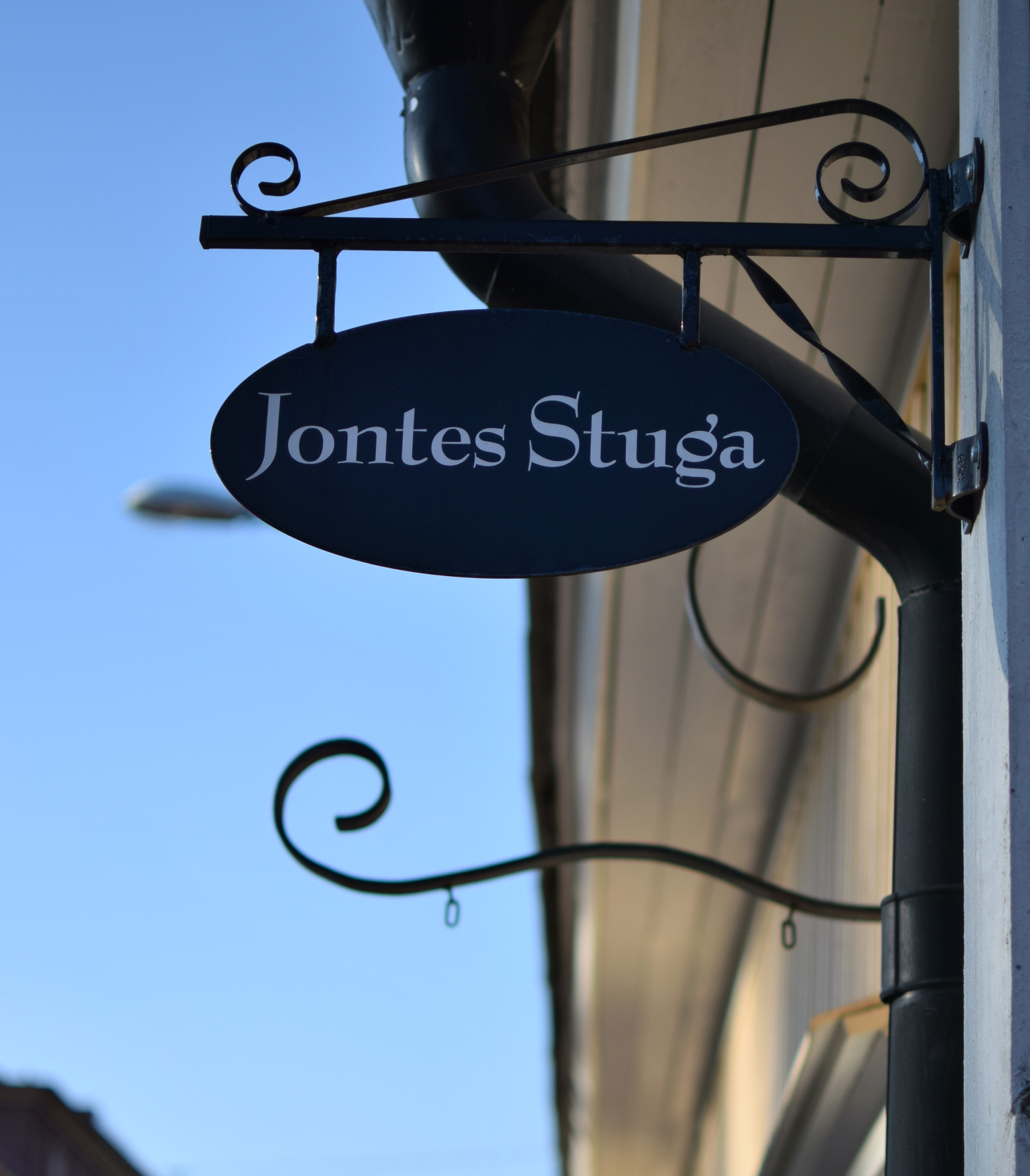 En skylt på Jontes stuga, Övre Slottsgatan 3, Uppsala.